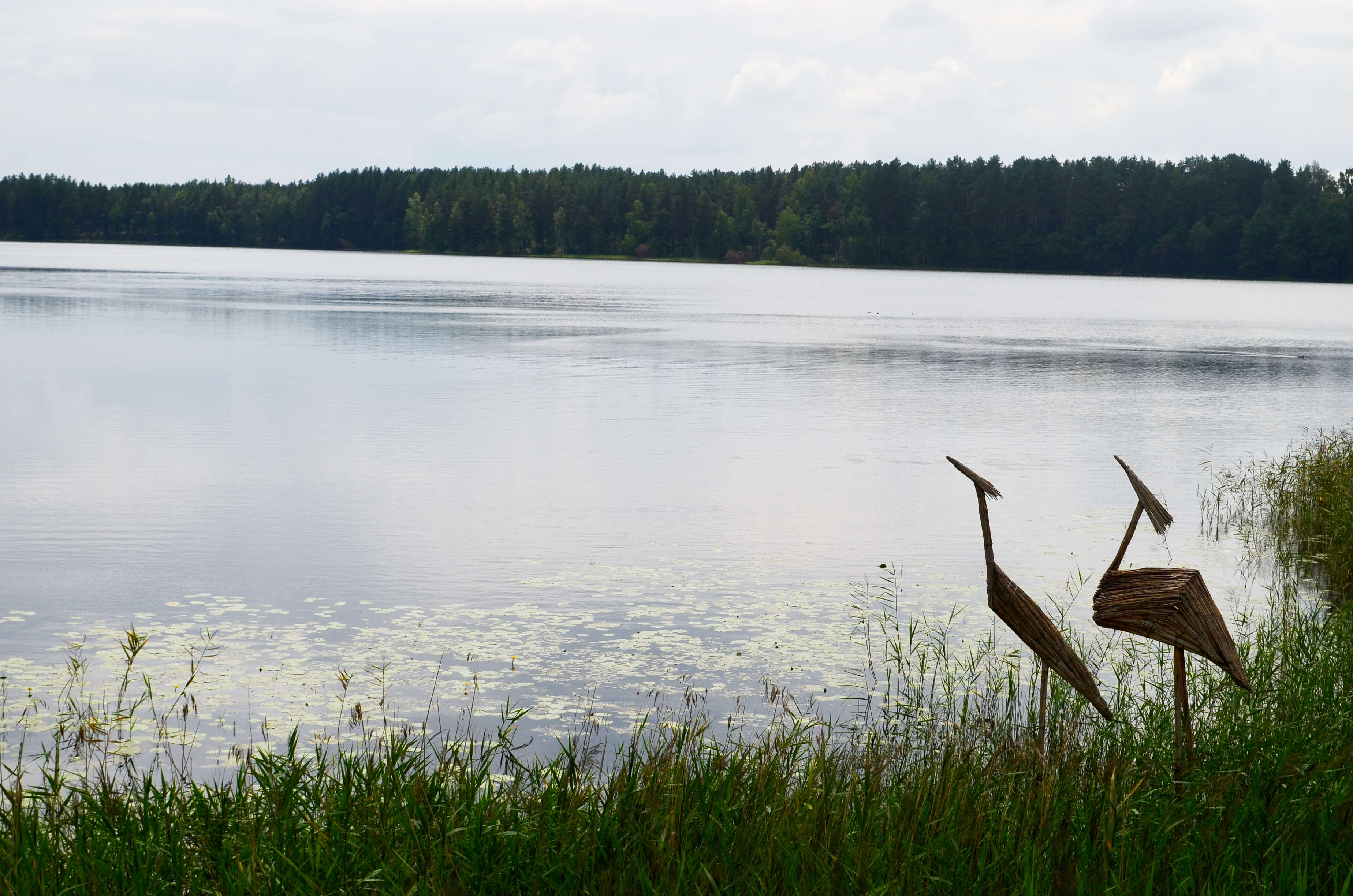 Ūsių ež., Linkmenys, Ignalinos raj.